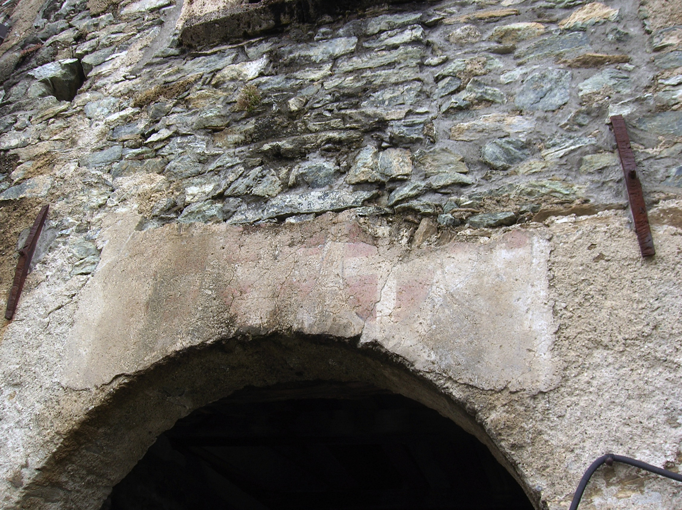 Maison Saluard detta anche Casaforte Marseiller. Località Marseiller, Verrayes, Valle d'Aosta, Italia.